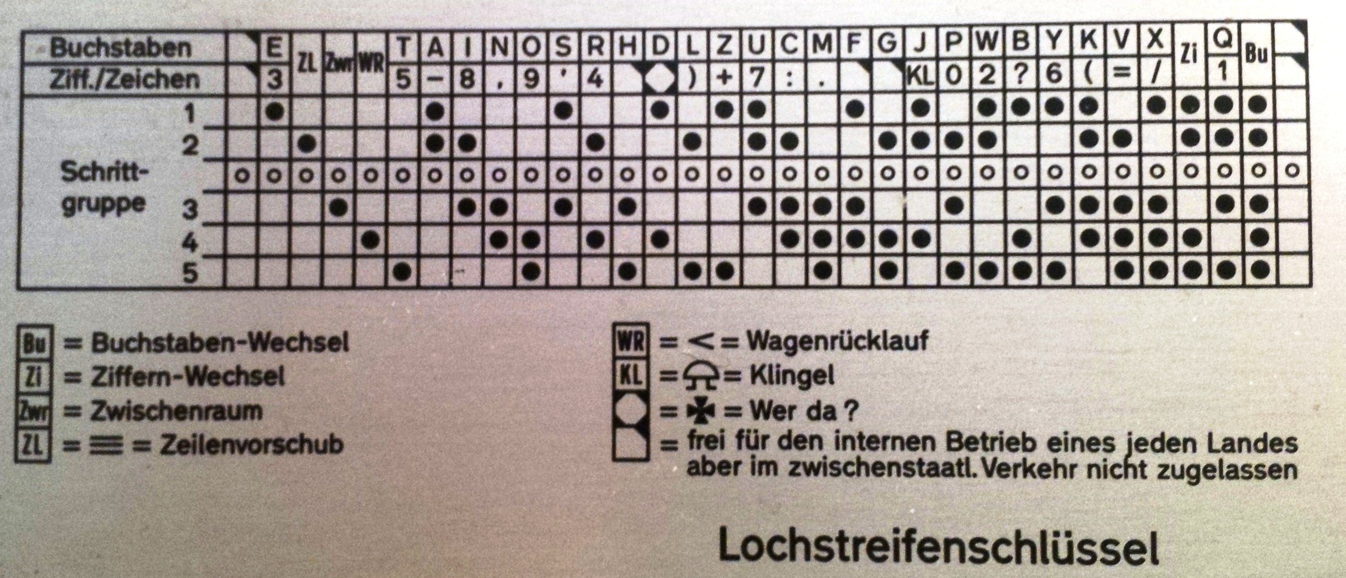 Lochstreifenschlüssel zum Auslesen